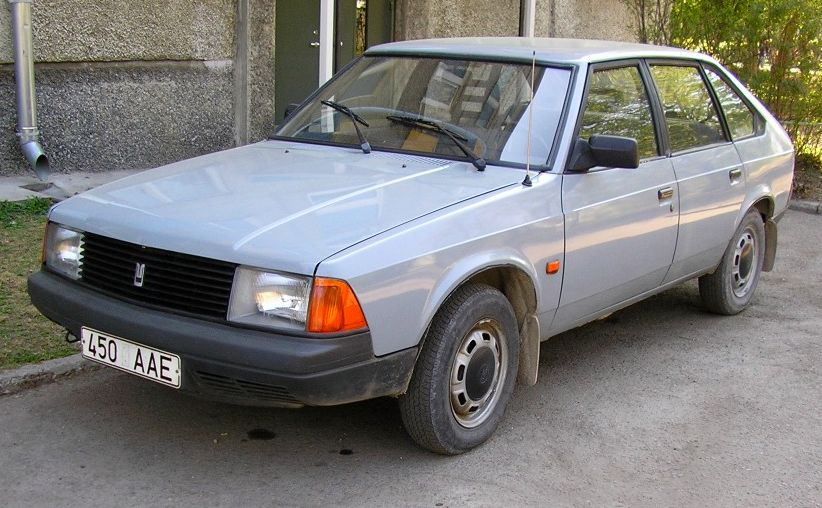 Moskvitch 2141S "Aleko" in Tallinn, Estonia